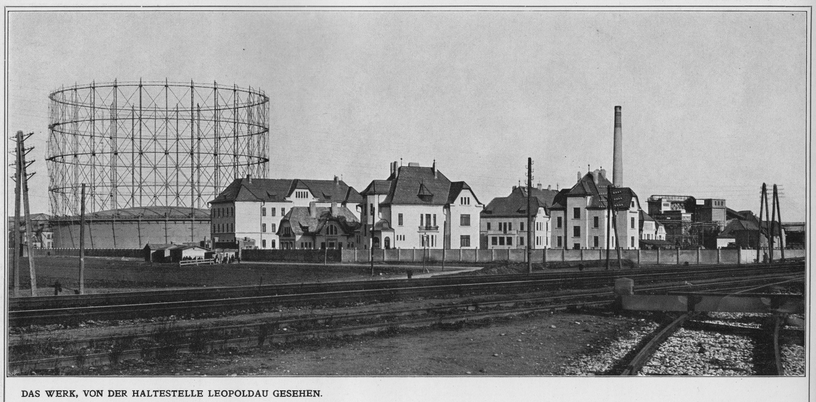 Städtische Gaswerk Leopoldau: Das Werk, von der Haltestelle Leopoldau gesehen, 1911